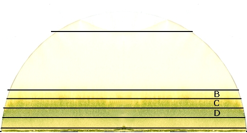 Chromatographie sur papier filtre (laboratoire).